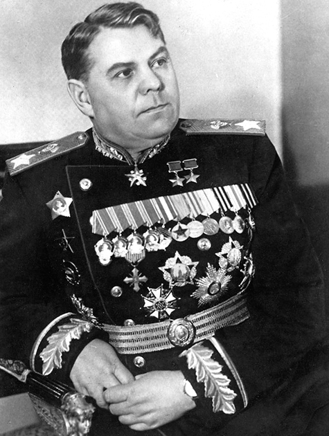 Александр Михайлович Василевский (1895 — 1977) — советский военачальник, Маршал Советского Союза